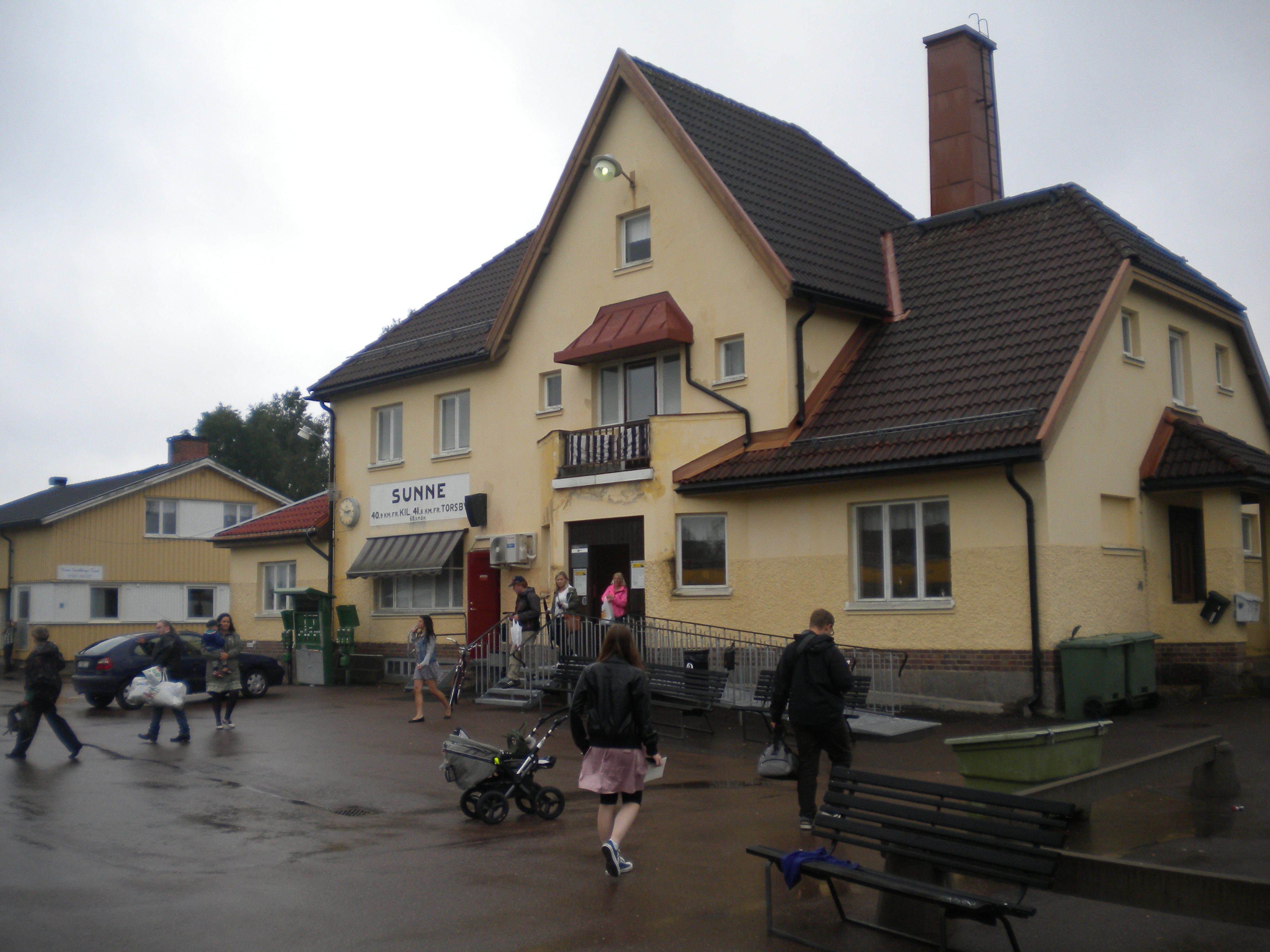 Stationshuset i Sunne. Byggt 1913. Arkitekt Yngve Rasmussen